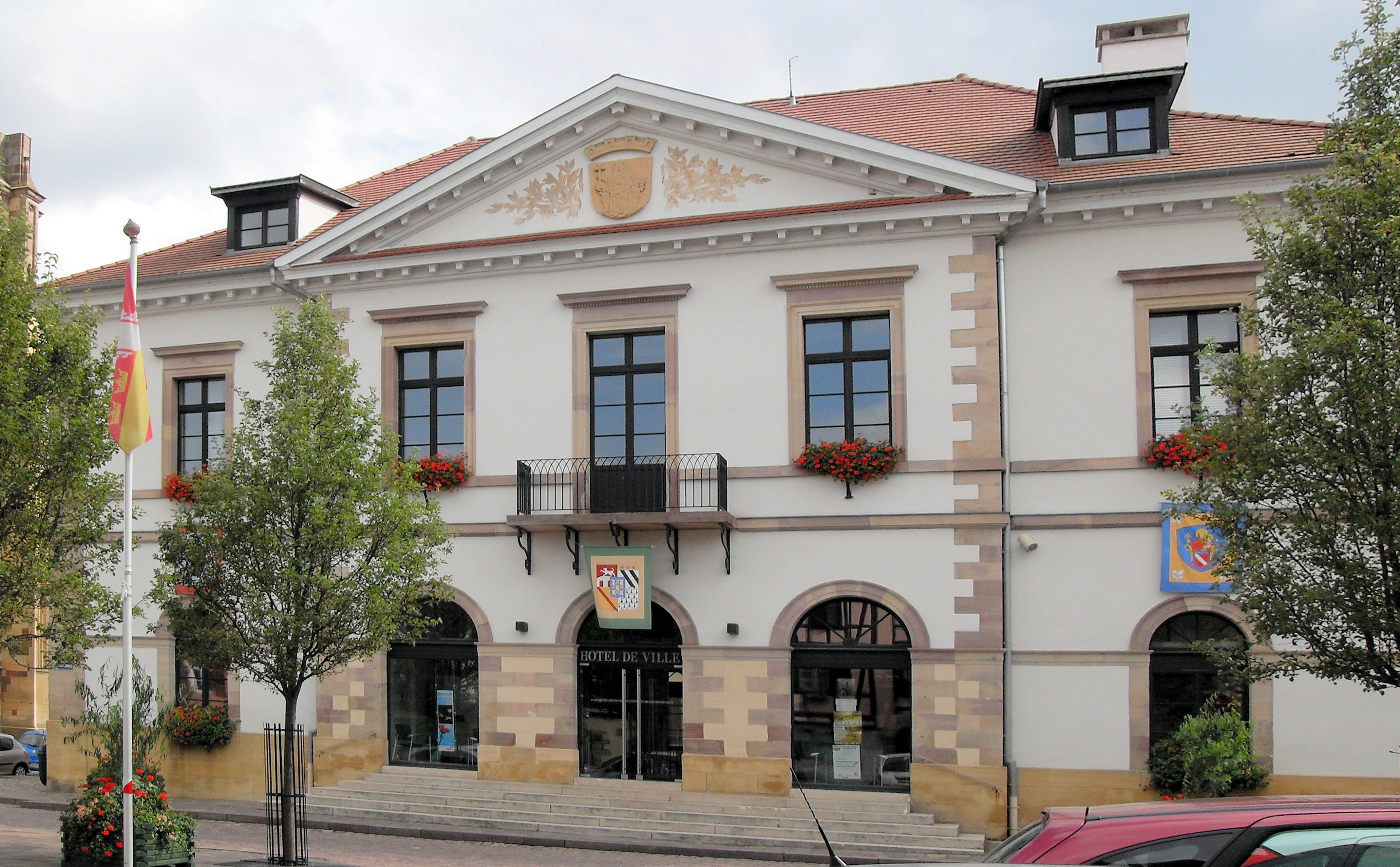 L'hôtel de ville de Rouffach